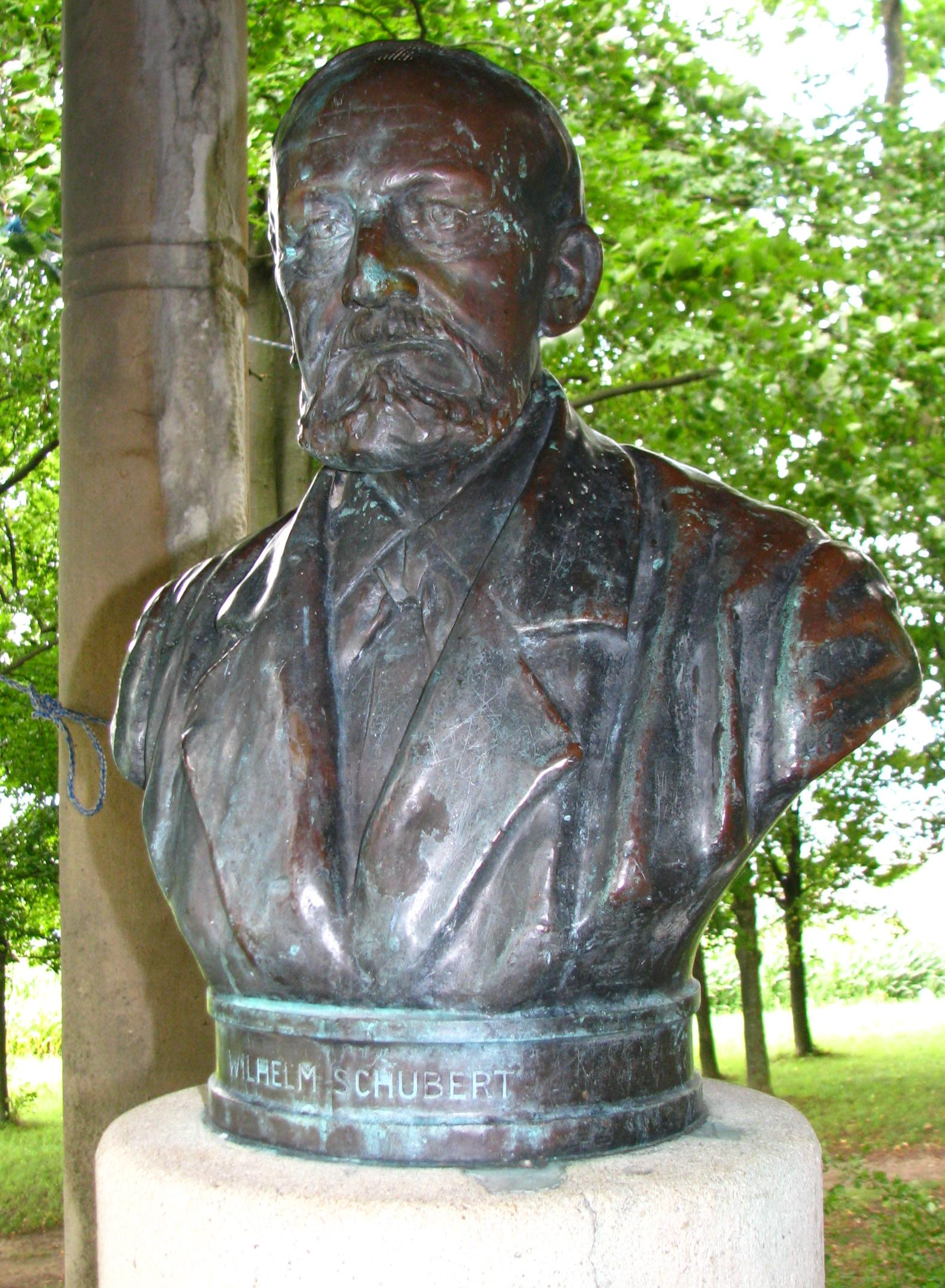 Büste Wilhelm Schuberts auf dem Lahrer Schutterlindenberg.